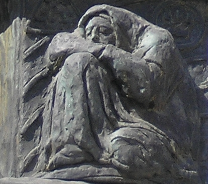 The Knesset Menorah, Jerusalem (detail - Kabbalah)